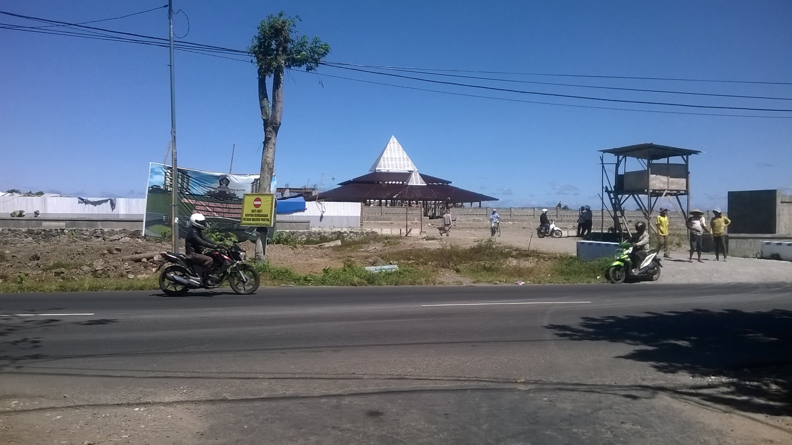 Pusat pemerintahan kabupaten Blitar di kec. kanigoro